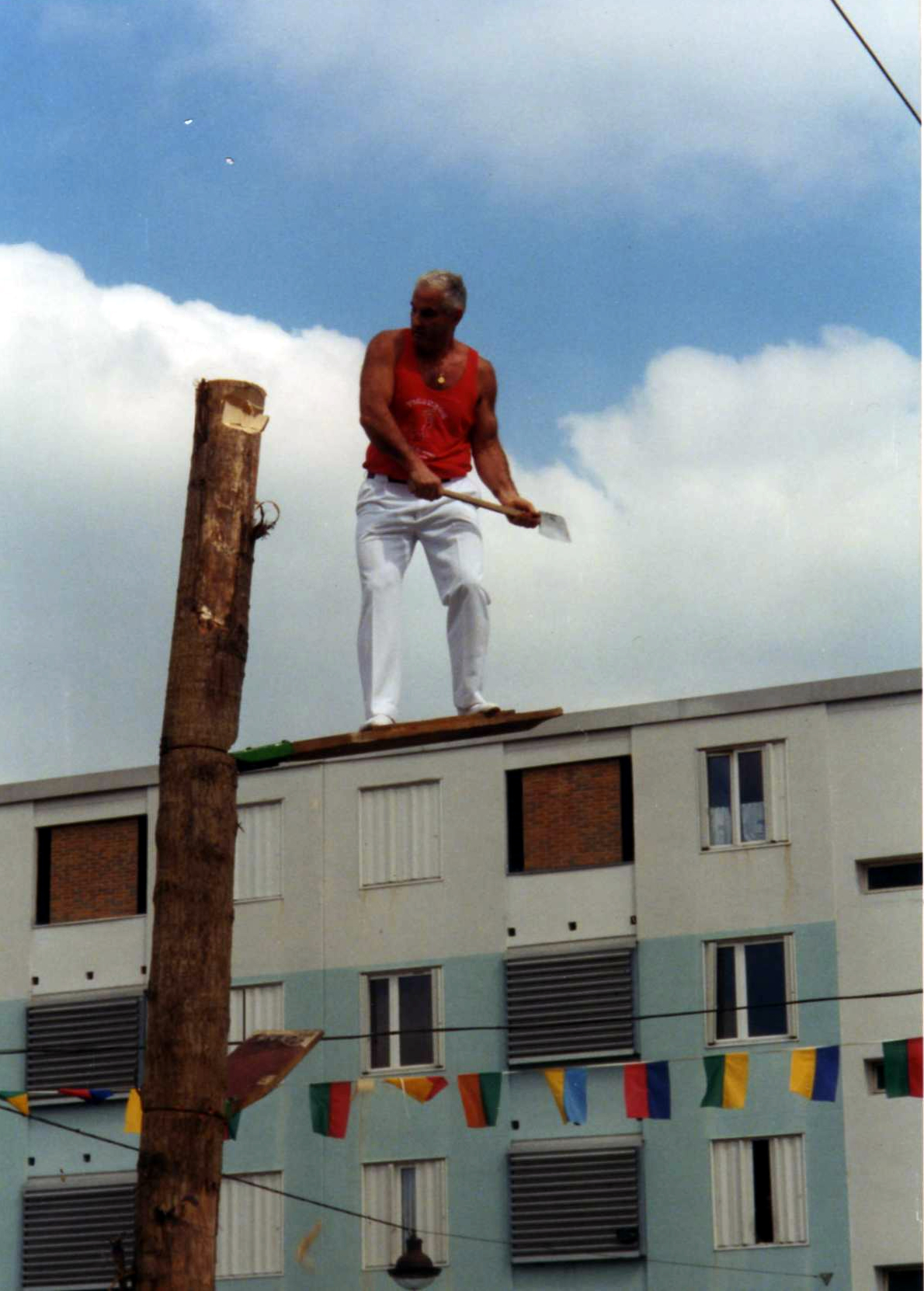 Force basque à Mourenx (Pyrénées-Atlantiques) (Pyrénées).